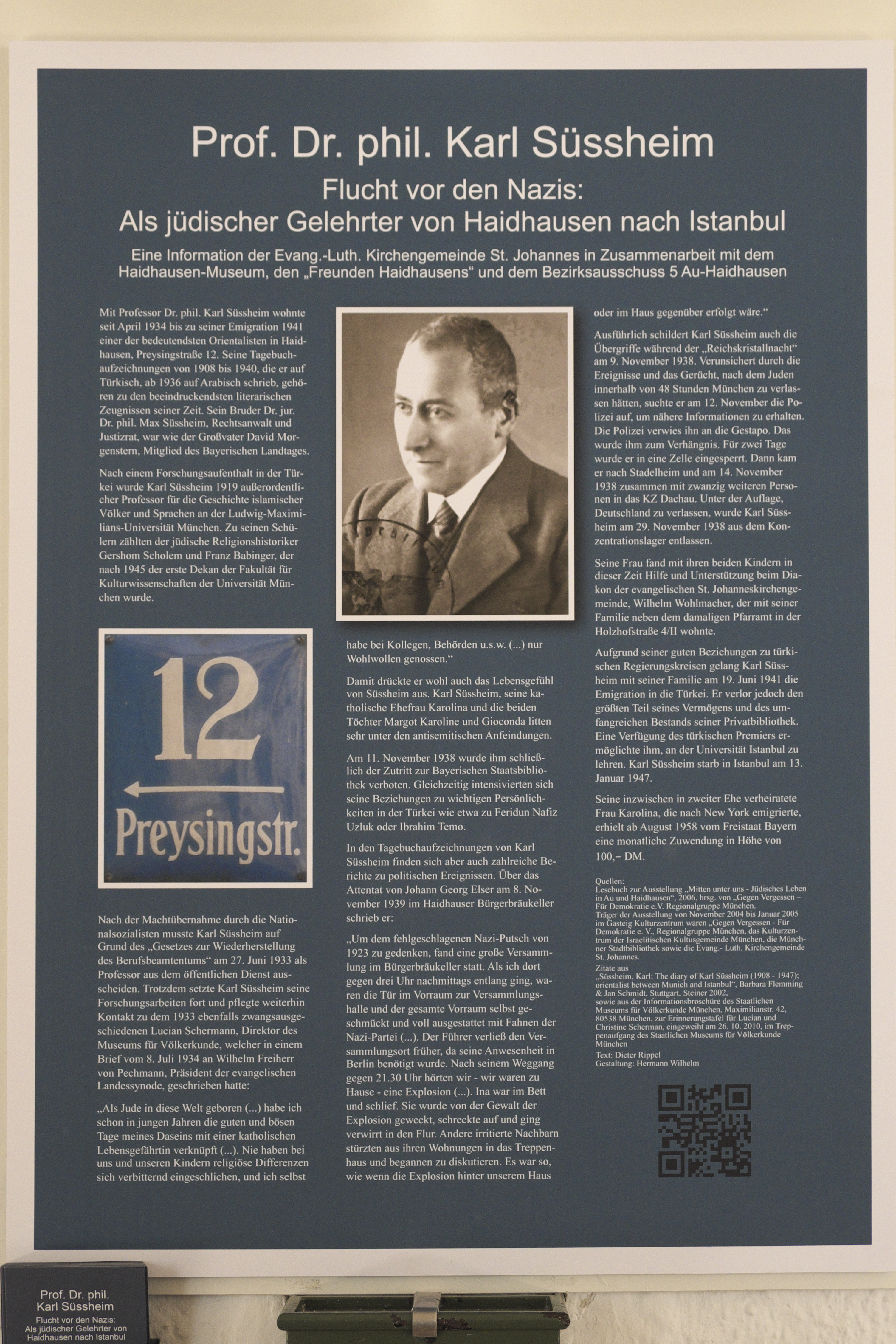 Evangelisch-lutherische Pfarrkirche St. Johannes in der Preysingstraße 17 in Haidhausen im Stadtbezirk Au-Haidhausen in München (Bayern/Deutschland), Informationsblatt zu Karl Süssheim